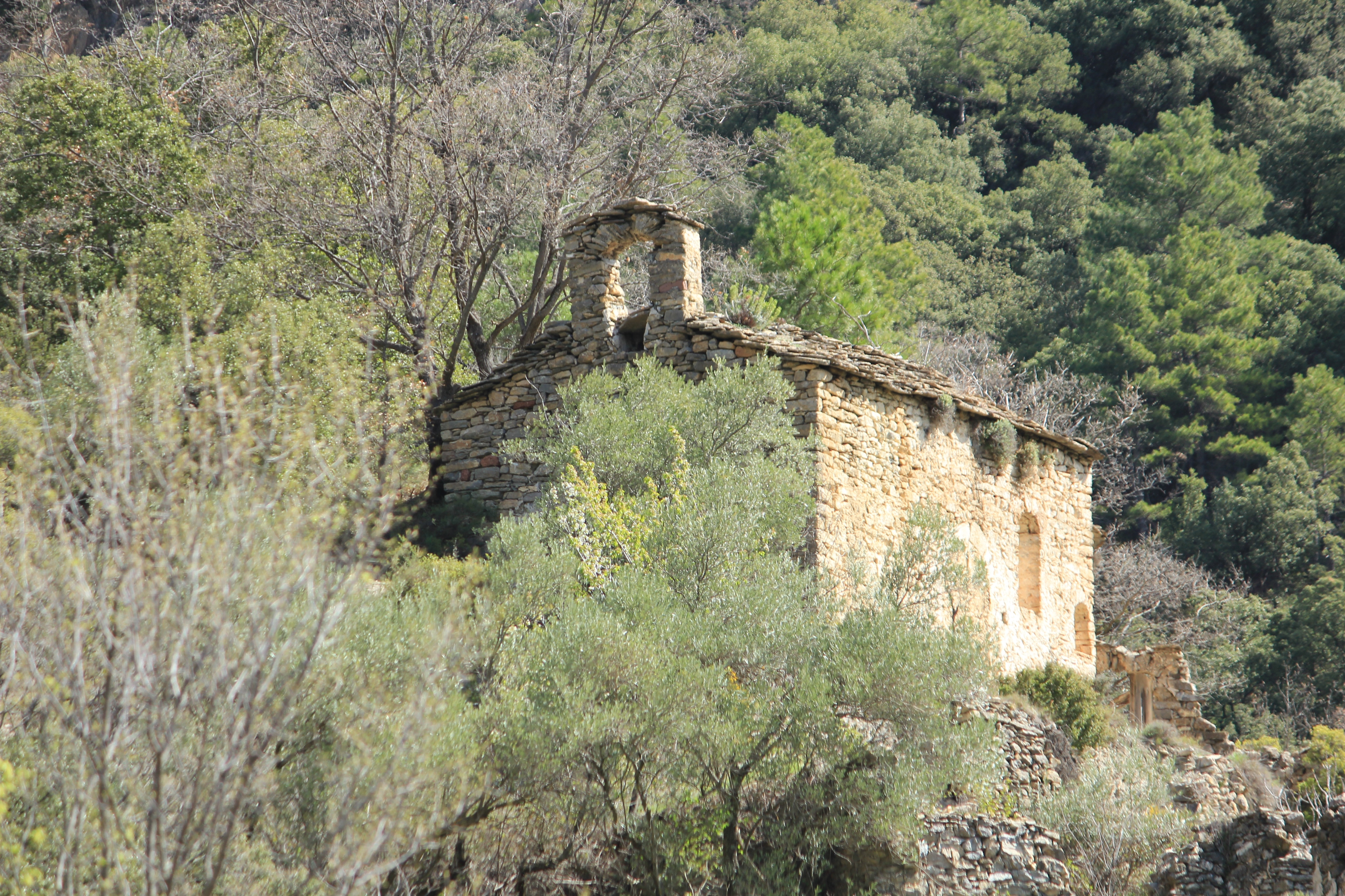 Església parroquial de Sant Bartomeu de Malgrat (les Valls d'Aguilar)